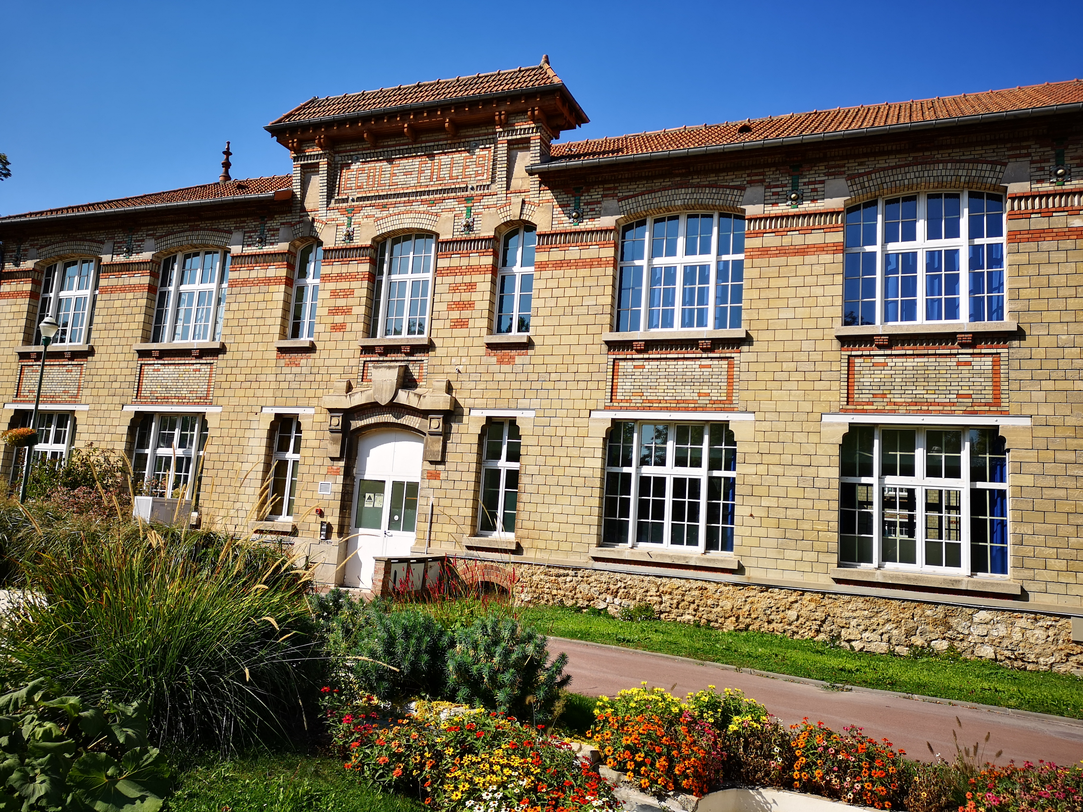 ecole Jules Guesde de Houilles inaugurée en 1903